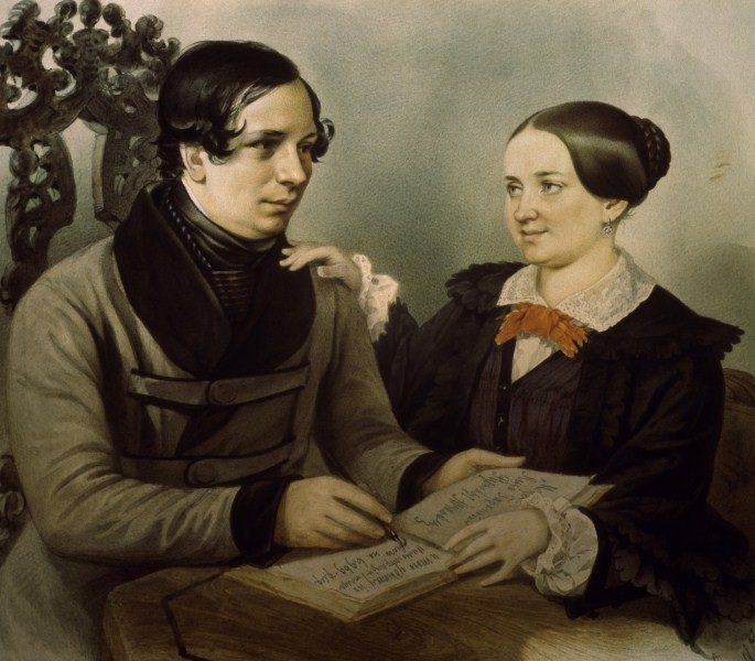 Нестор Васильевич Кукольник с женой Софьей.